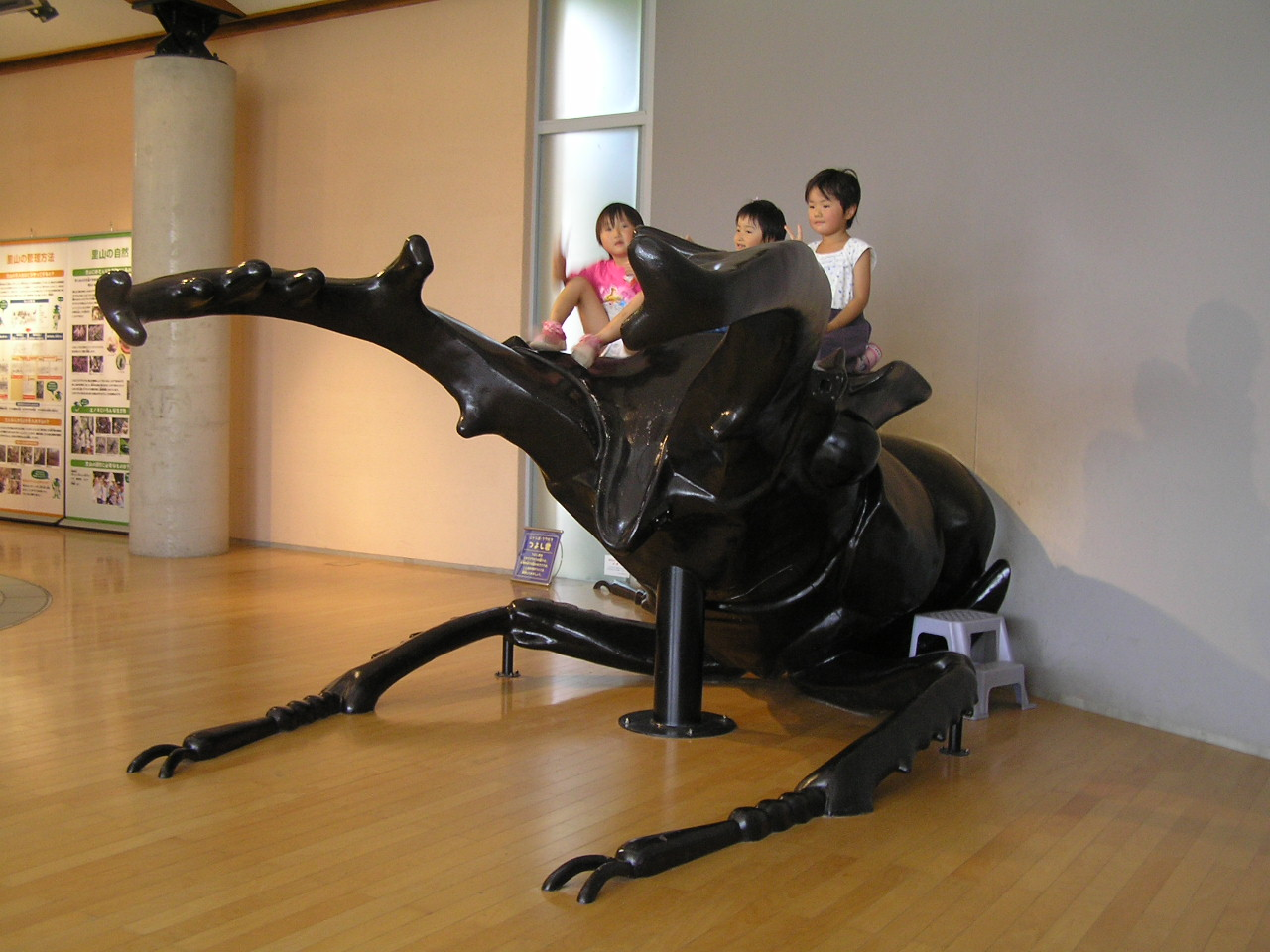 兵庫県立有馬富士公園/県内最大の都市公園/豊かな自然を活かし、「自然休養型の文化公園」を基本テーマとした広域都市公園です。多目的ホールや会議室を備えたパークセンターや、生態園、棚田、かやぶき民家などの野外施設が整備されています。(財団法人 兵庫県園芸・公園協会） ～photo by Autumn Snake 【おぉたむ すねィく探検隊】 arimahuji_park